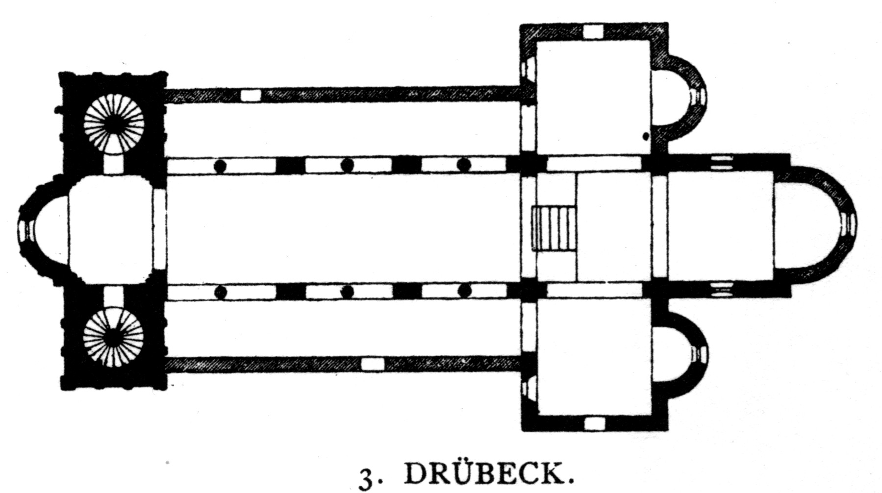 Drübeck. Klosterkirche, Floor plan.